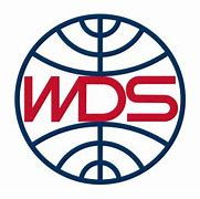 WDS Logo